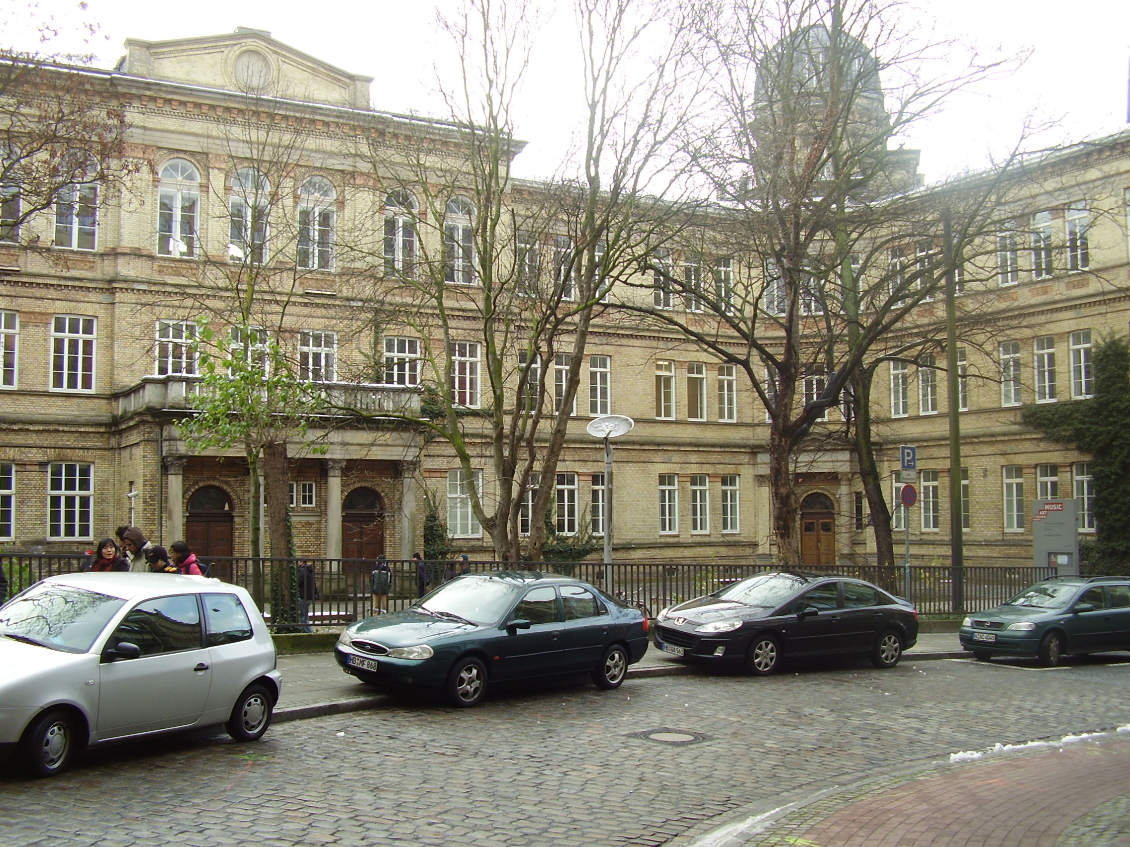 Gebäude des Fachbereichs Musik der Hochschule für Künste Bremen in der Dechanatstraße 13/15 (ehemaliges Altes Gymnasium)